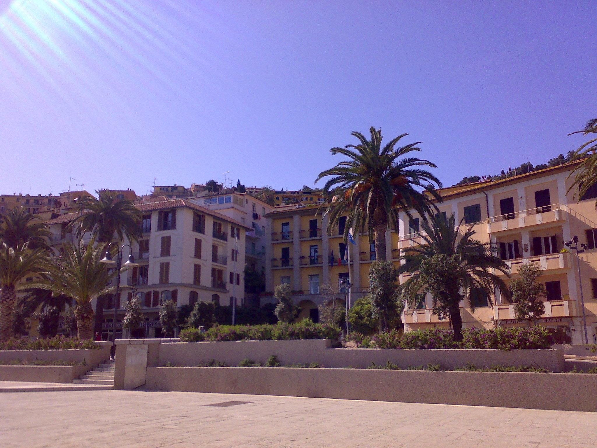 Porto Santo Stefano, Piazzale dei Rioni, sullo sfondo il palazzo comunale.